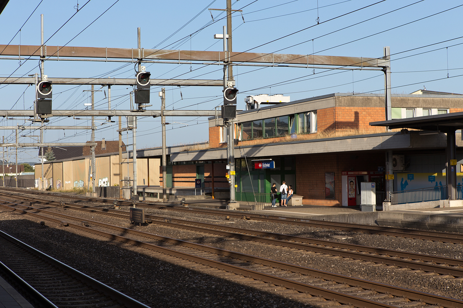 Bahnhof Rothrist (AG)